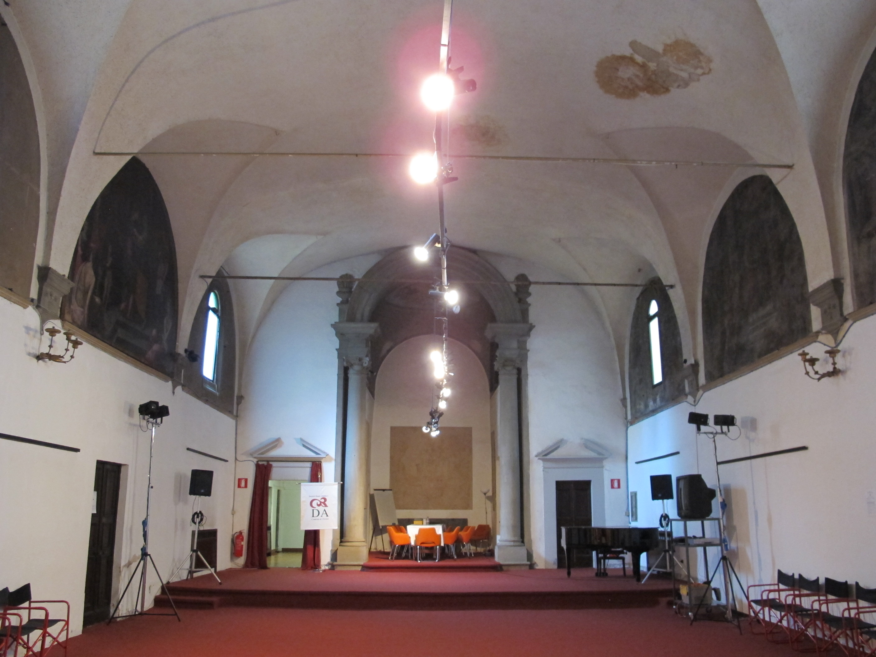 Ex-oratorio di san pierino